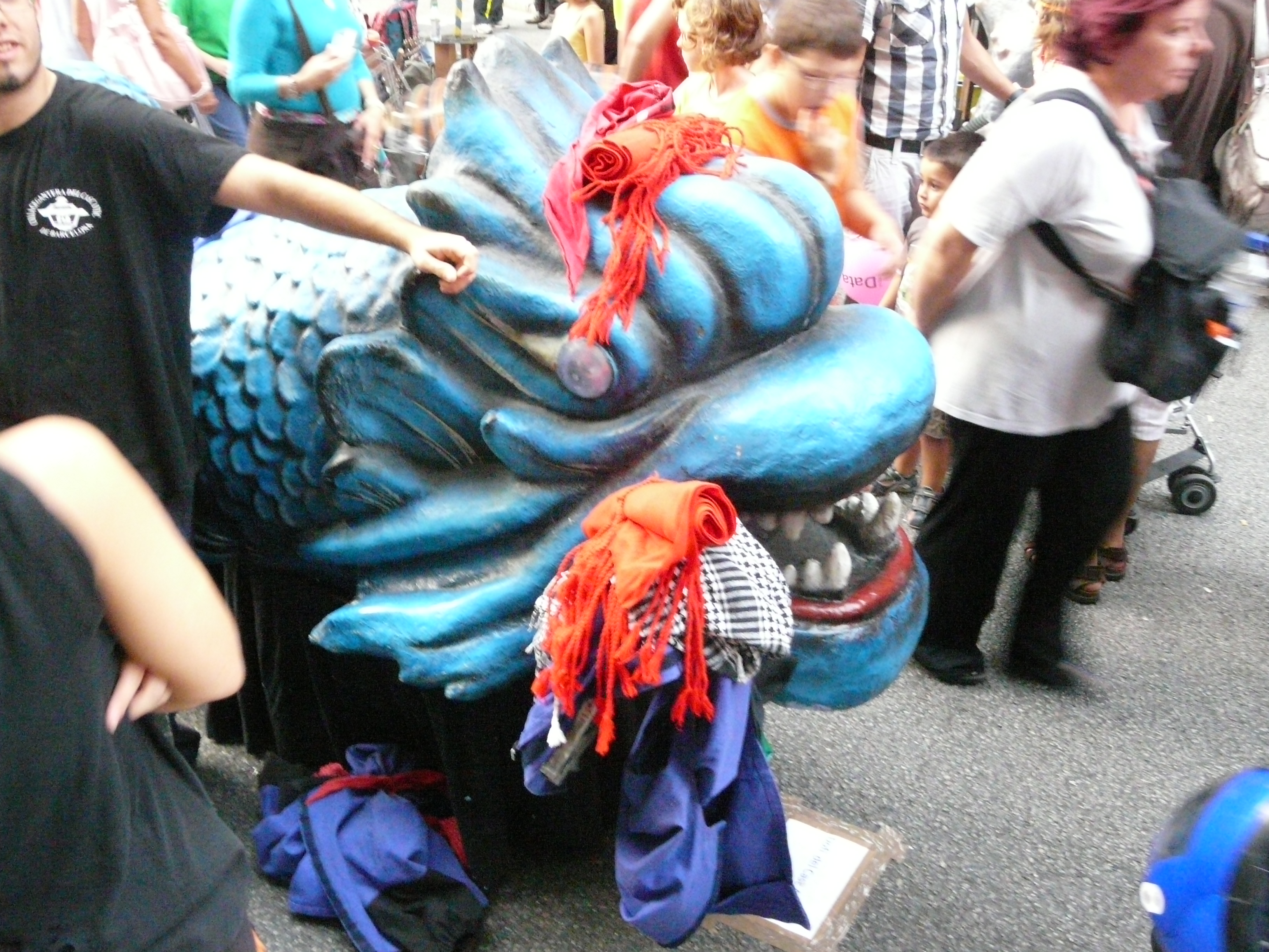 Imatge presa durant la tarda del diumenge 23 de setembre a les festes de la Mercè del 2012